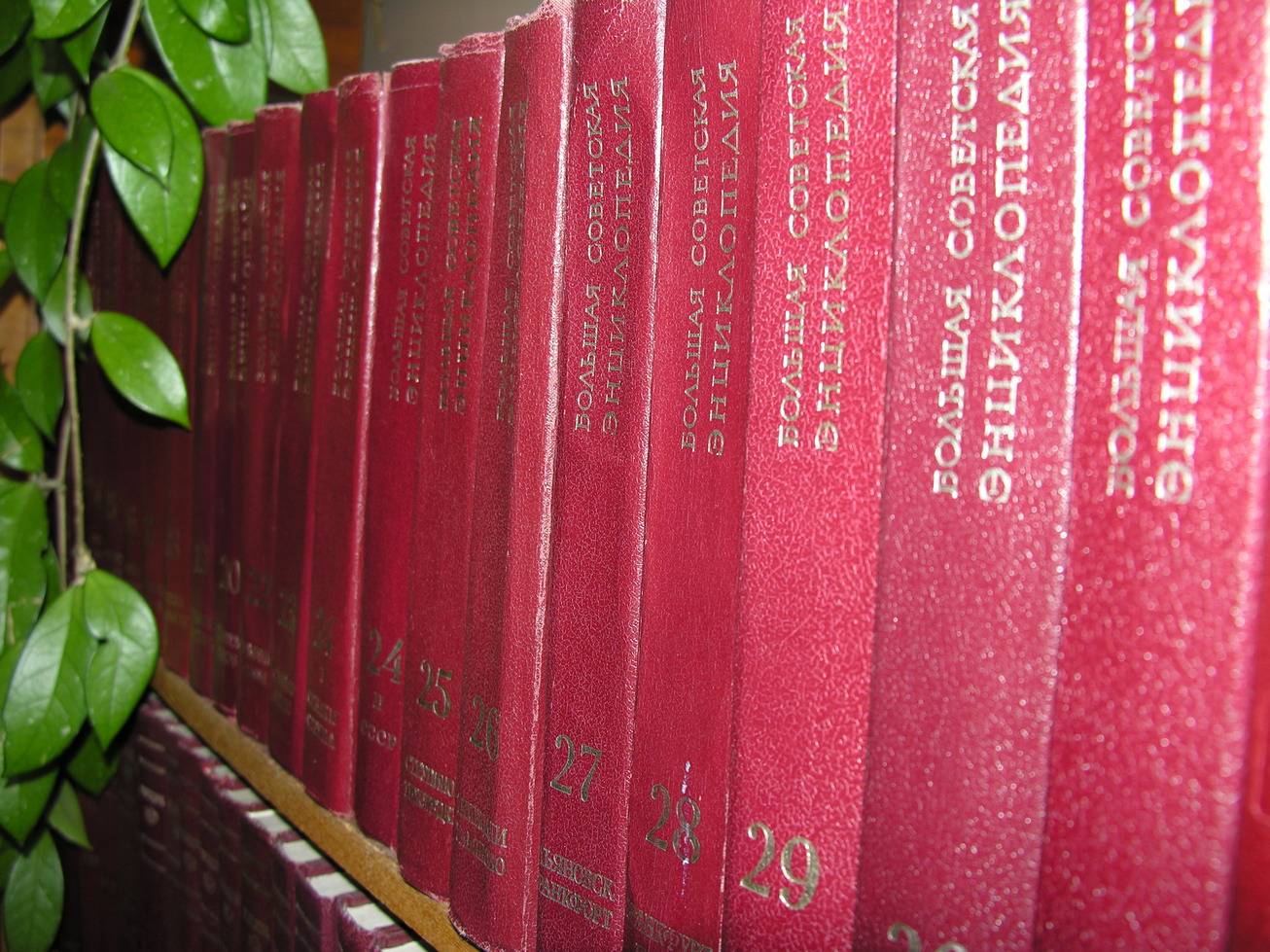 Bolšaja sovietskaja enciklopedija (Didžioji tarybinė enciklopedija) Maskva, III leidimas, 1969 - ?, 1-30 t.